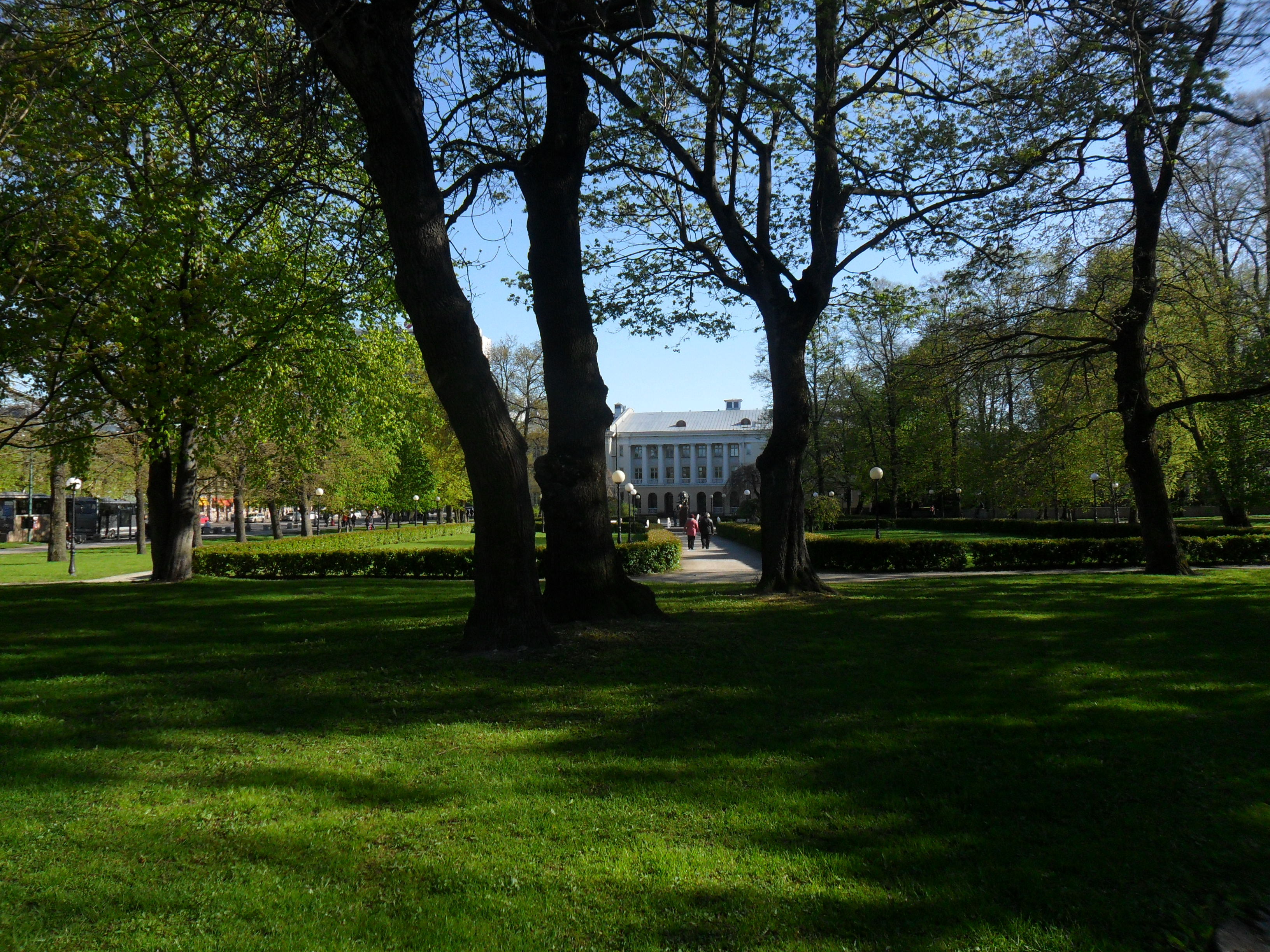 Kanuti aia park